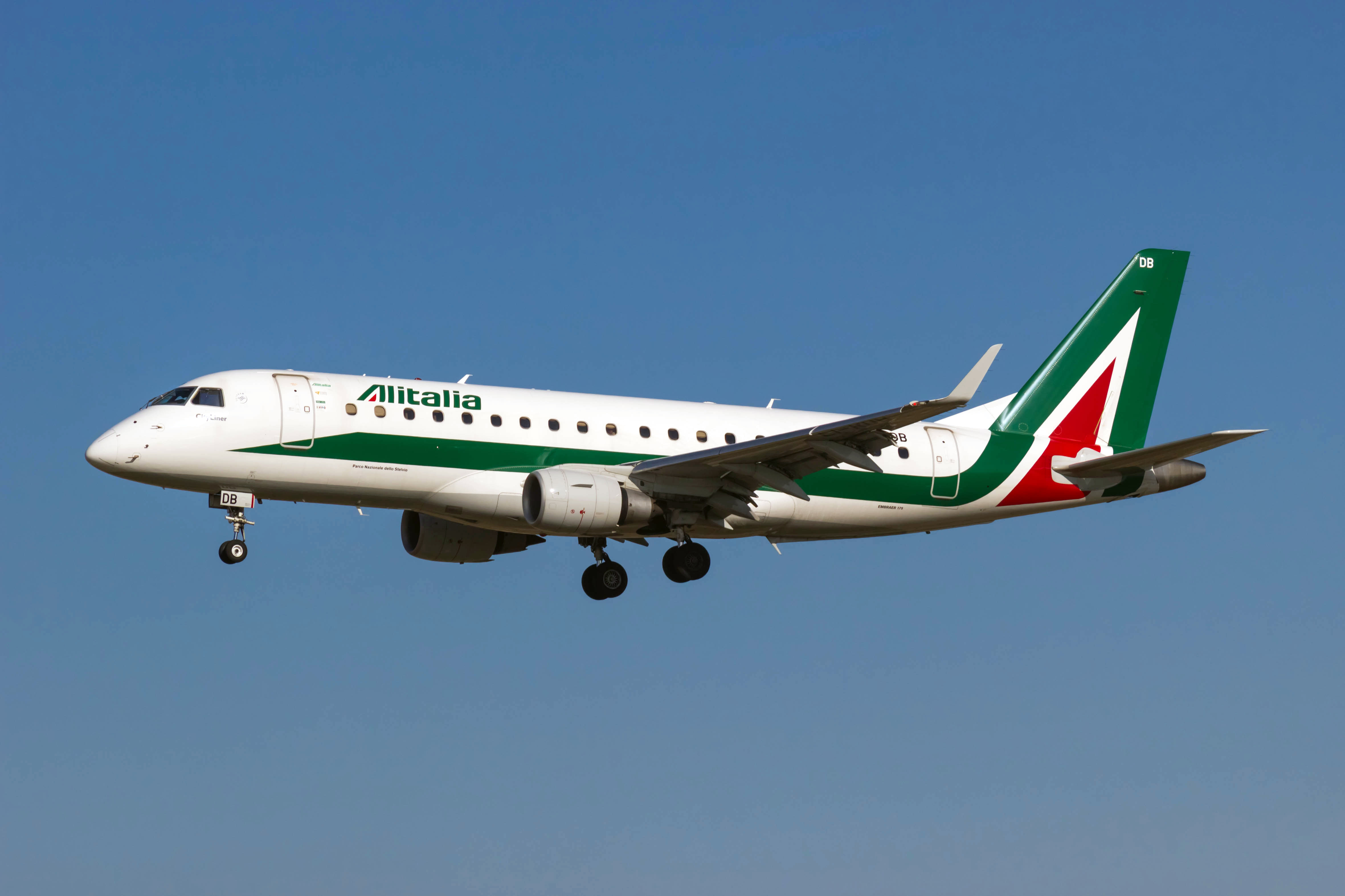 Embraer 175 de Alitalia aterrando no aeroporto de Barcelona.